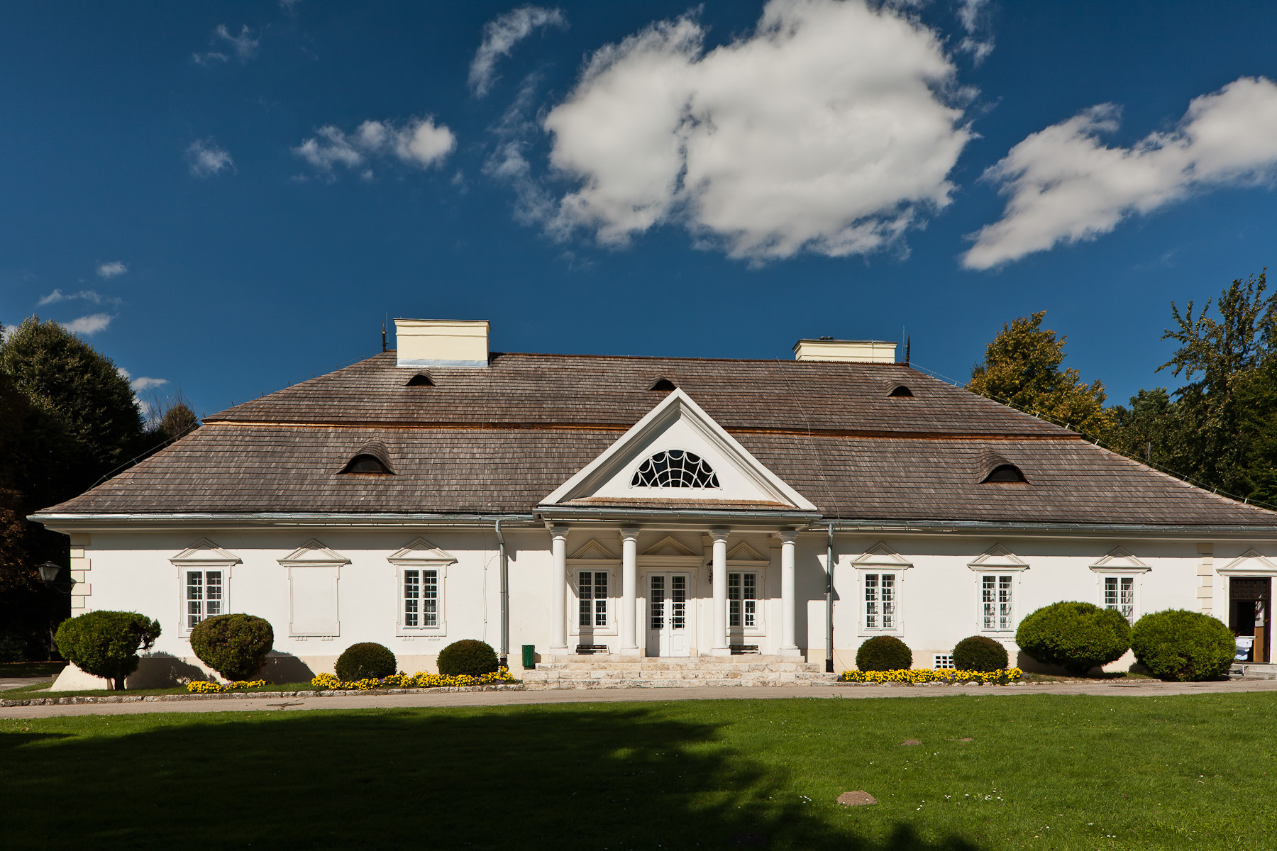 Zespół dworski, Modlnica - widok na dwór